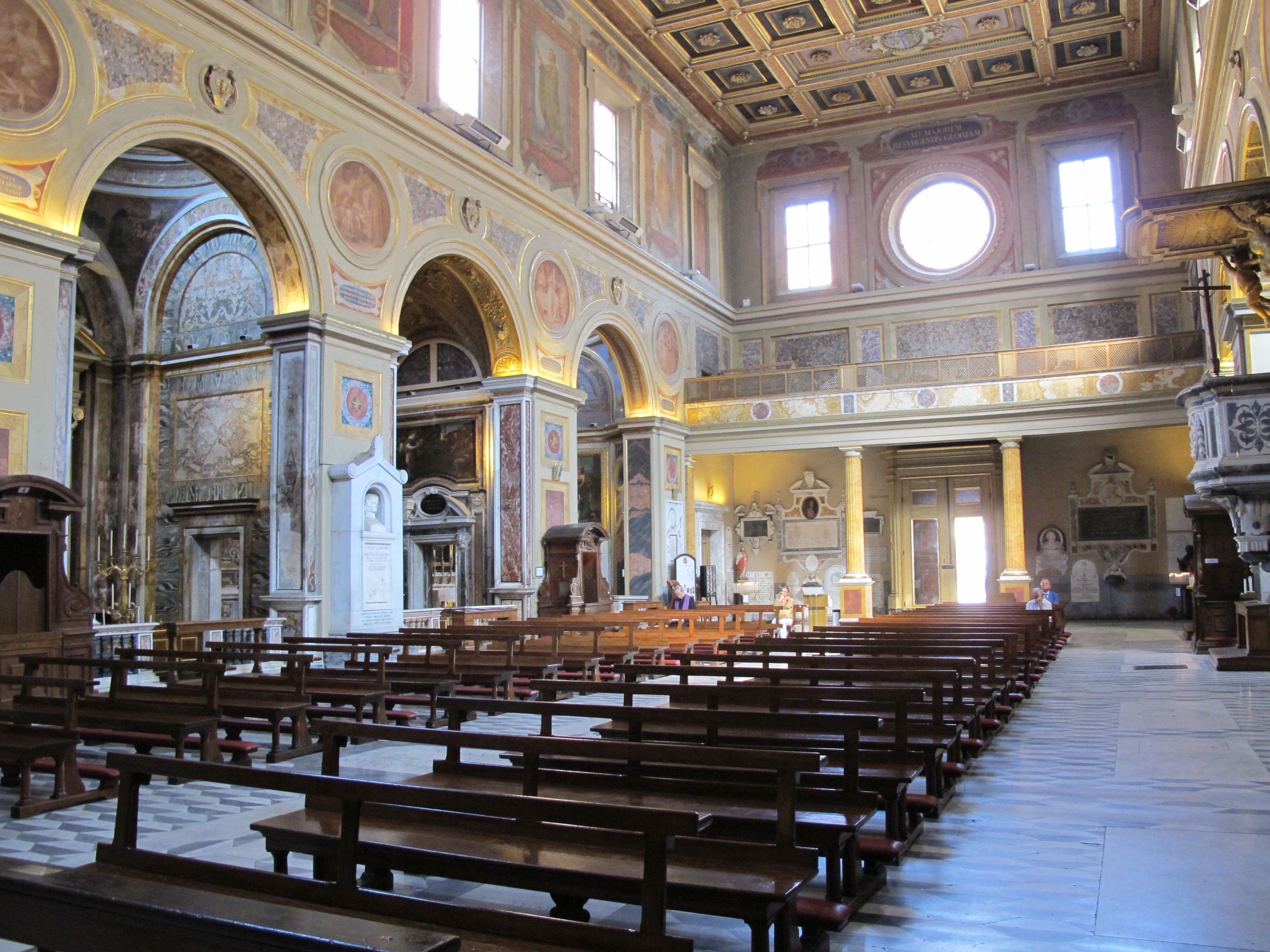 roma, san lorenzo in lucina